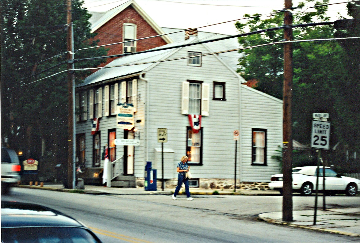 Jennie Wade Birthplace